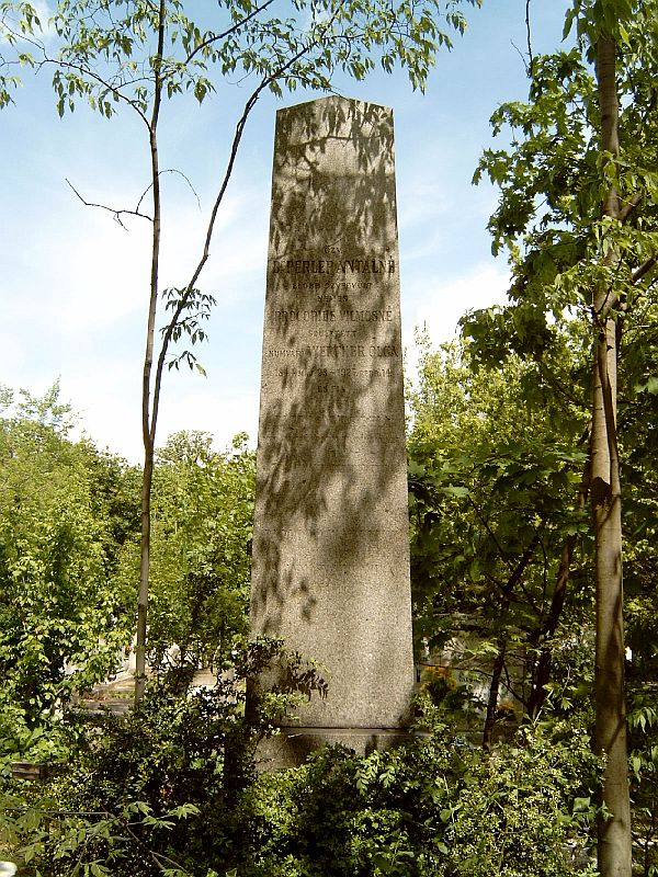 Procopius Béla (1868-1945) numizmatikus (rendkívüli követ és meghatalmazott külügyminiszter, 1928/29-ben) sírja Budapesten. Új köztemető: 21/2-1-15. Rövid életrajza: Káplár László: Ismerjük meg a numizmatikát. Budapest, 1984.